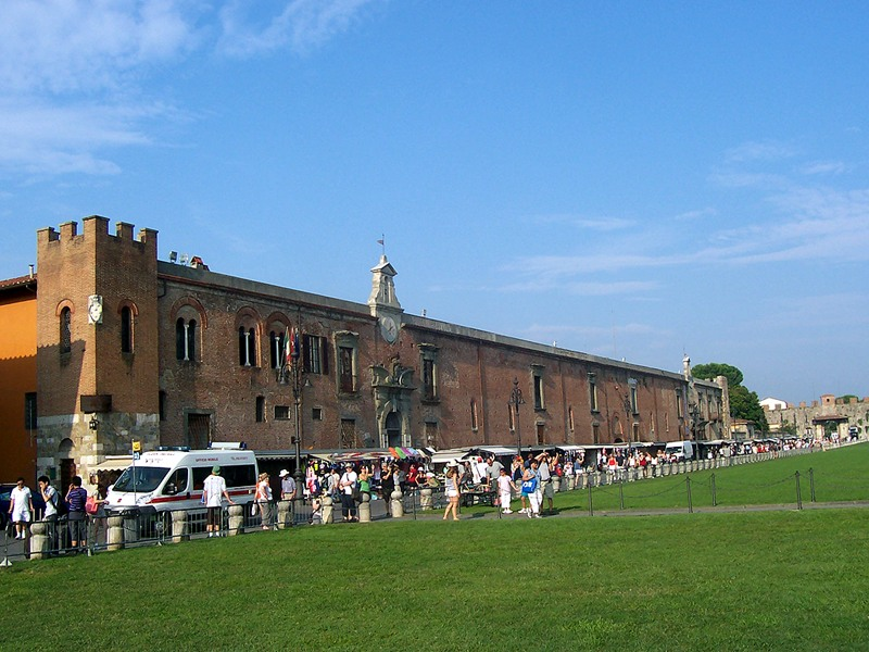 Pisa - Museo delle Sinopie